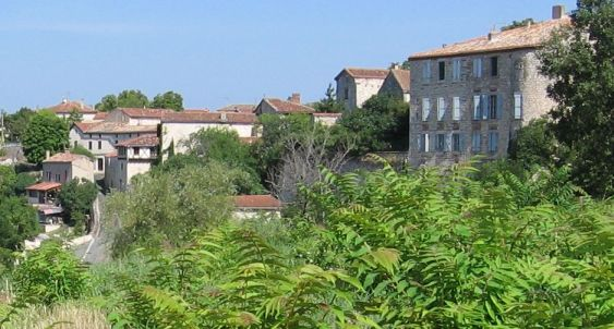 Mouzieys-Panens, département du Tarn, France